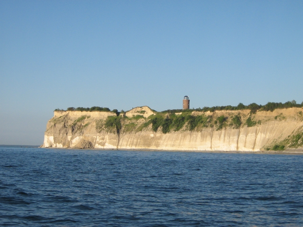 Kap Arkona von der Ostsee aus gesehen